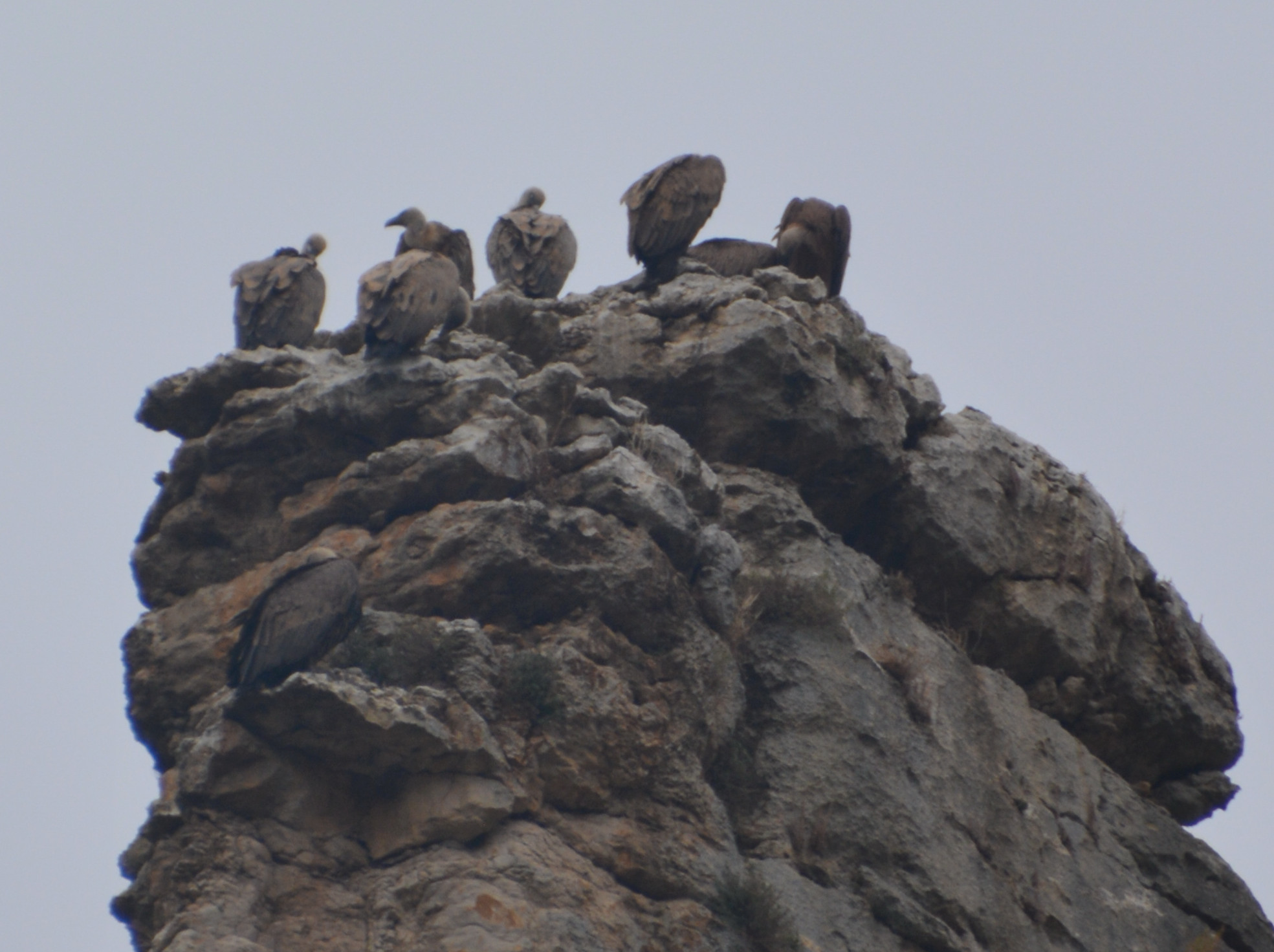 Sistema fluvial de los ríos Irati, Urrobi y Erro This is a photography of a Site of Community Importance in Spain with the ID: ES2200025. Natura2000 entry, EEA entry